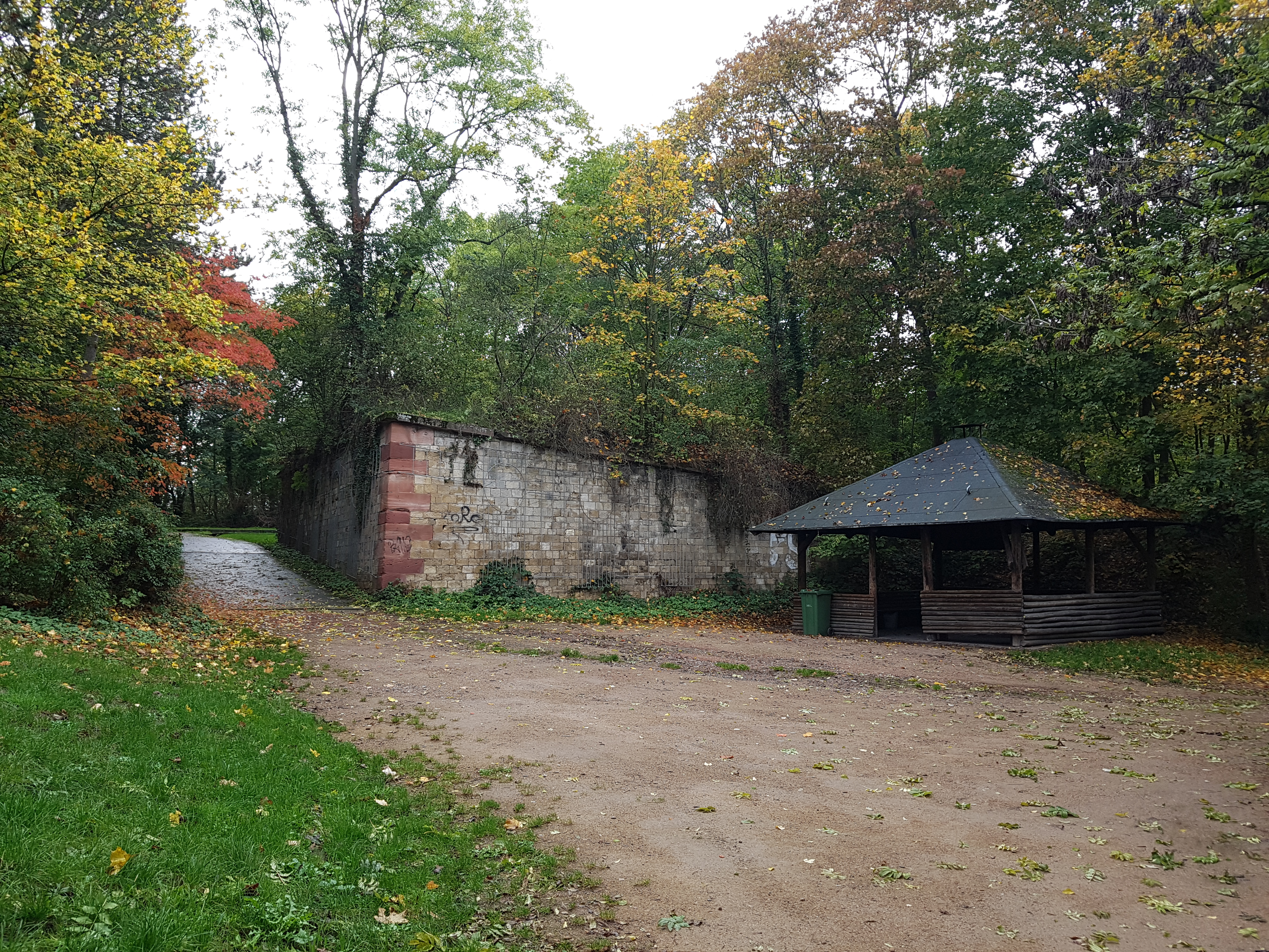 Das Fort Hartmühl(e) wurde in den 1920er Jahren teilweise abgerissen und verschwand weitgehende in den 1970er Jahren beim Anlegen des Hartenbergparks